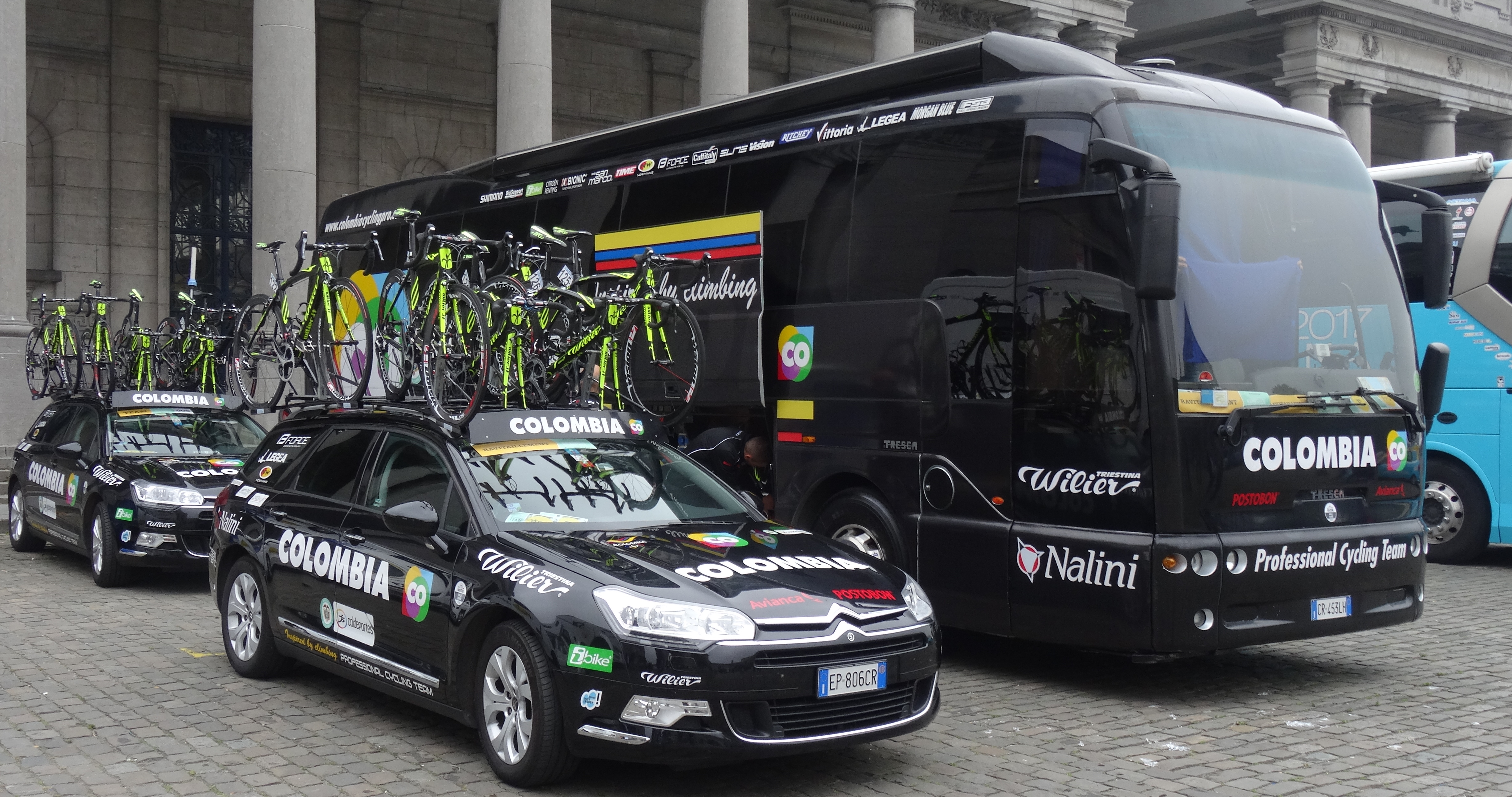 Brussels Cycling Classic 2014.